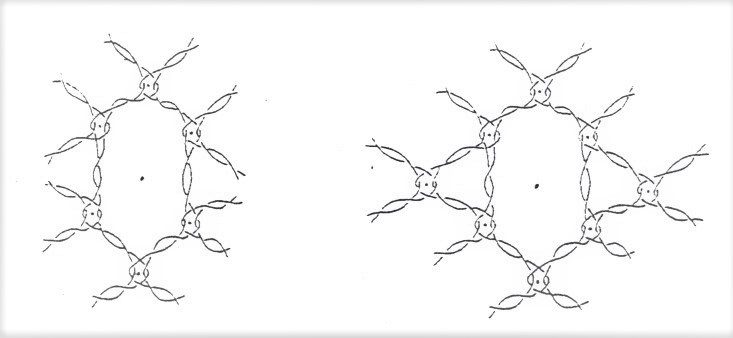 Dva varianty očka v paličkovanom tyle.